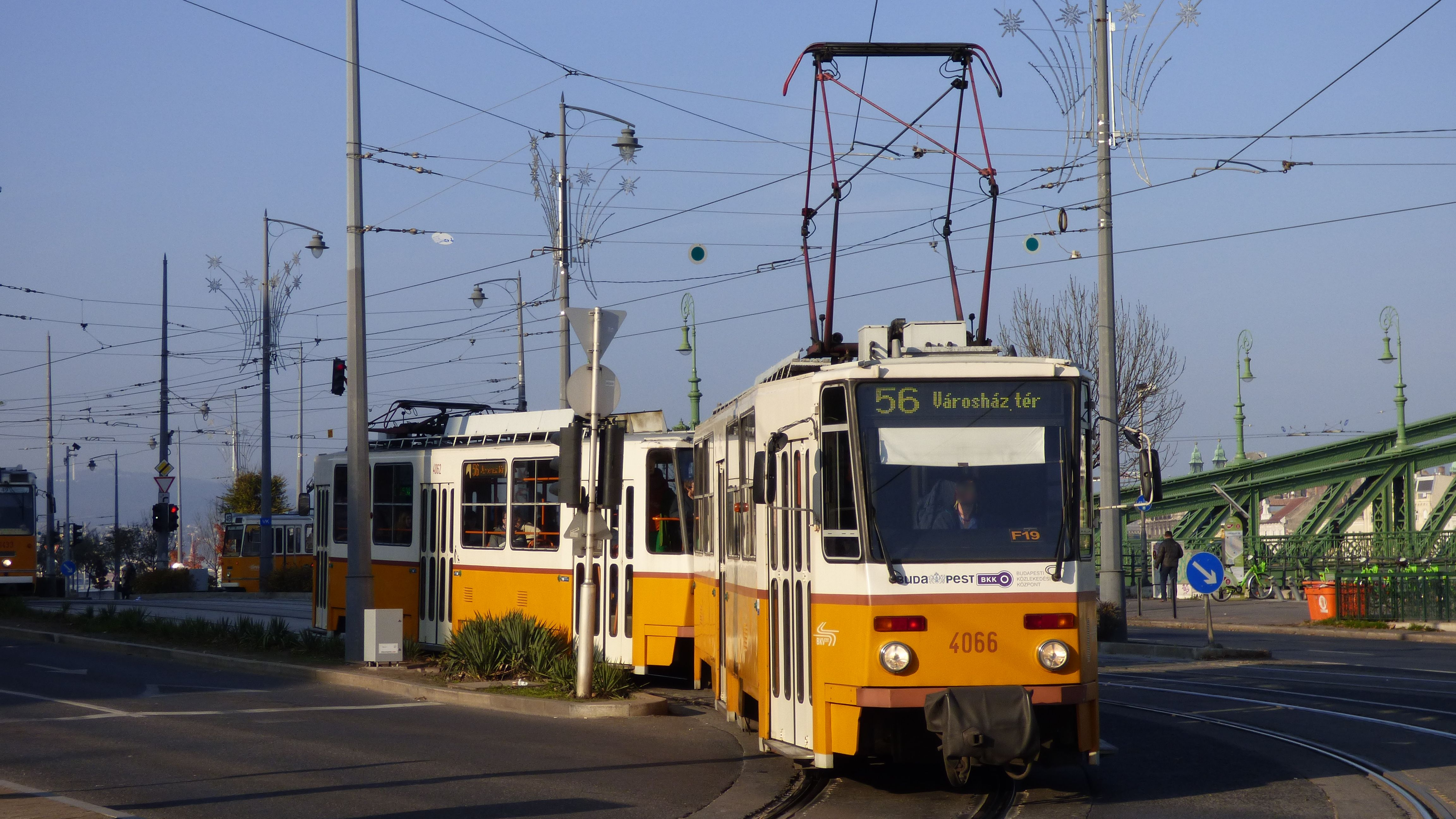 56-os jelzésű Tatra T5C5K villamos a Szent Gellért téren (psz. 4066+4062)